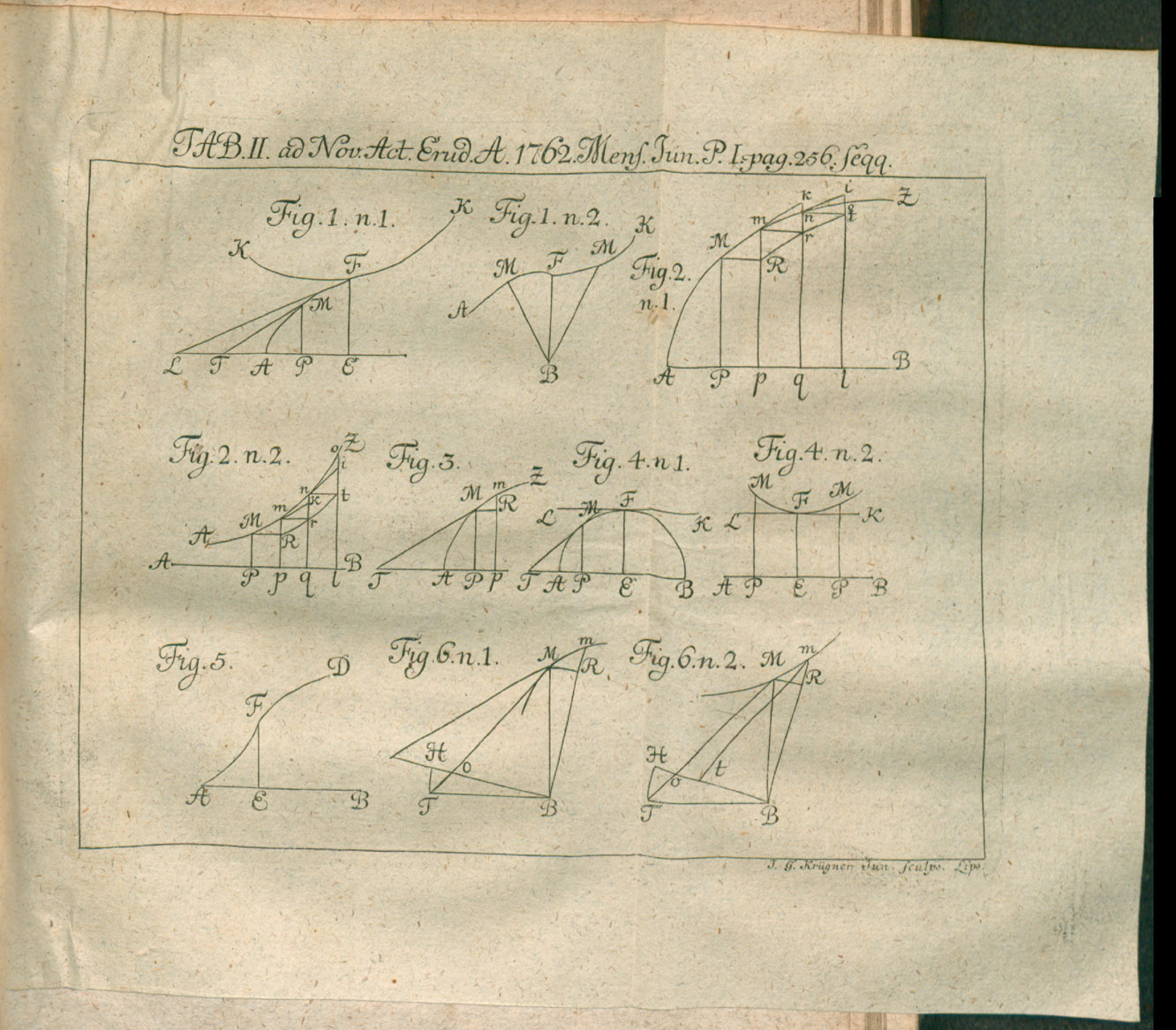 Illustration